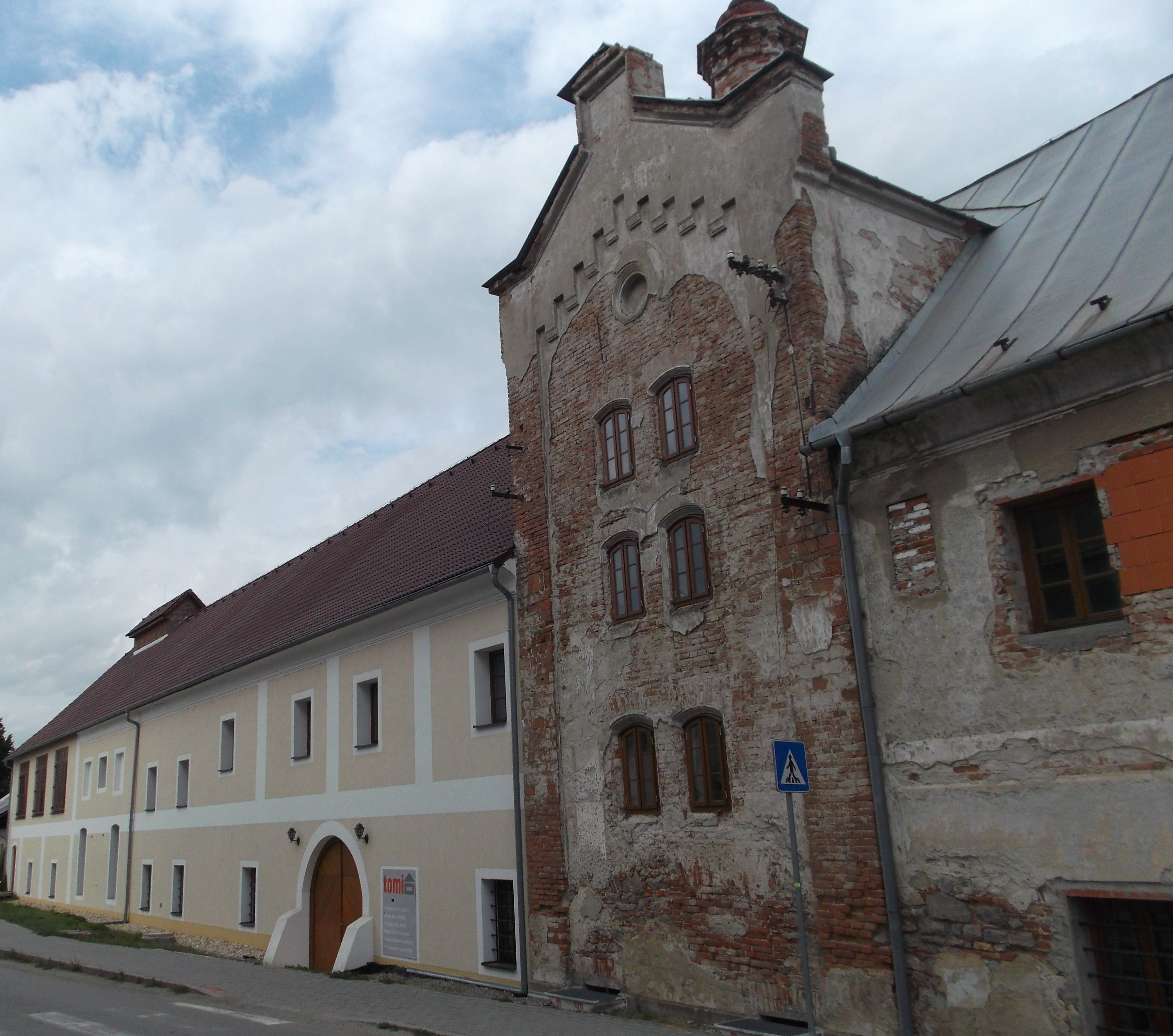 Pivovar